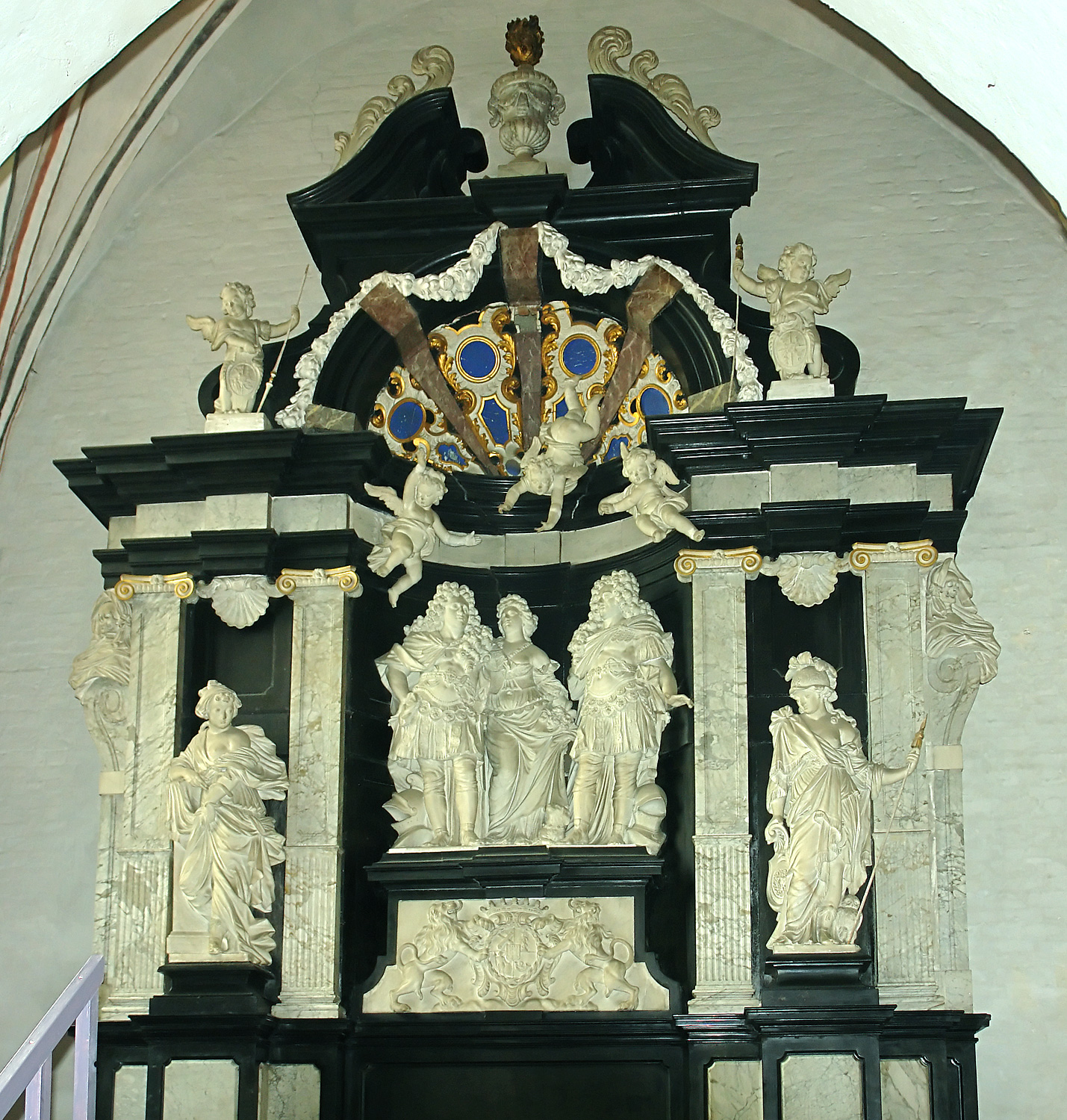 Dom zu Århus: Marselis-Kapelle, Epitaph von Thomas Quellinus (1661–1709) für das Grabmal Constantin Marselis (1647–1699)